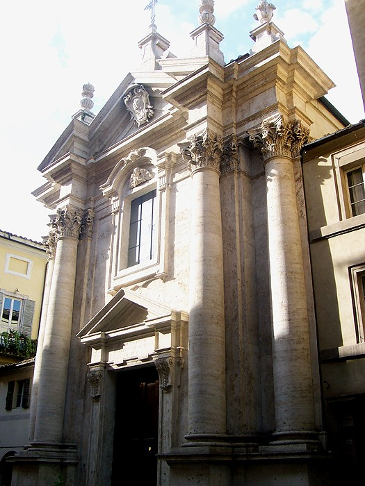 Siena - Chiesa di S. Giorgio